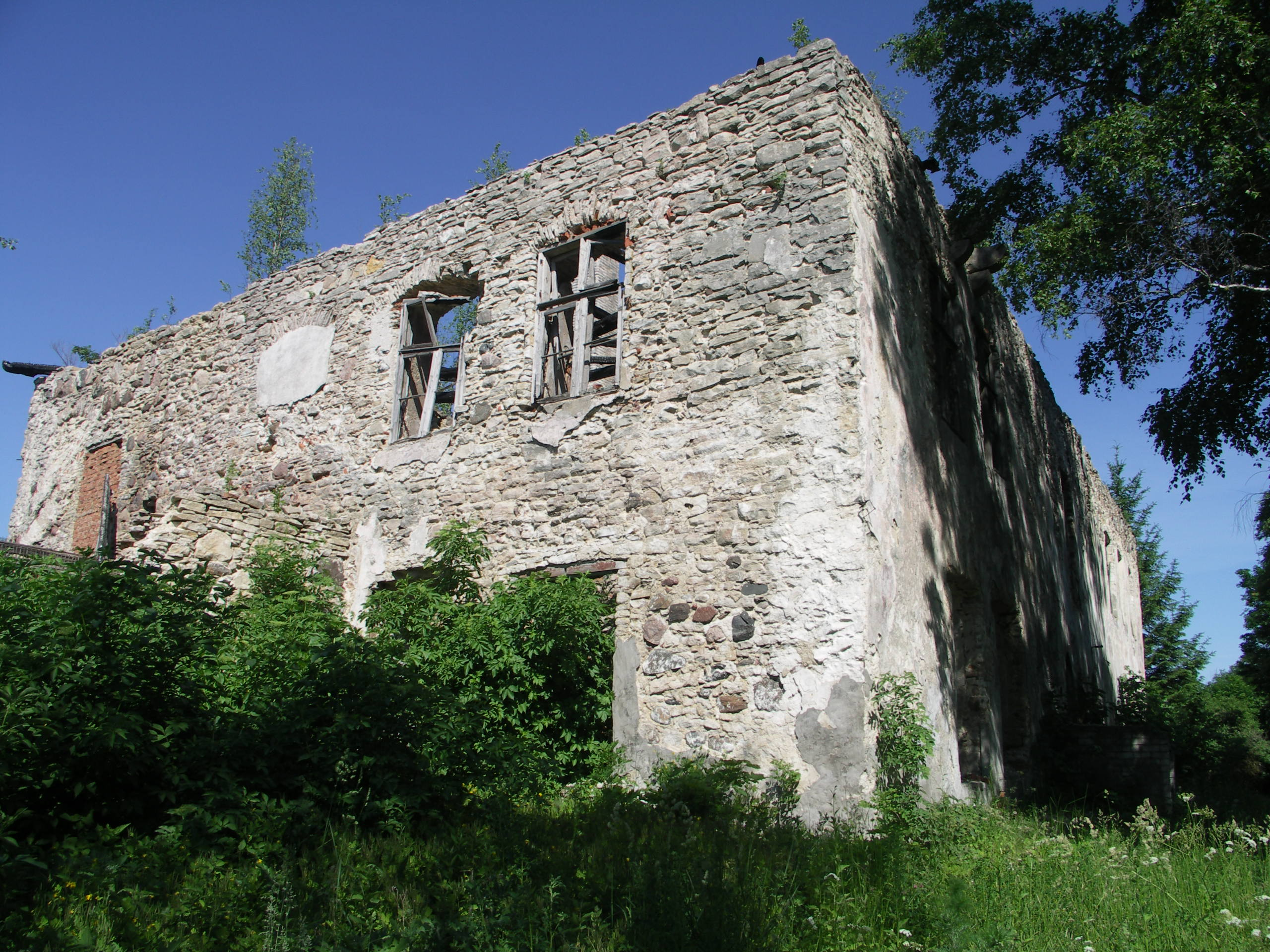 Kiltsi mõisa varemed Lääne maakonnas Ridala vallas